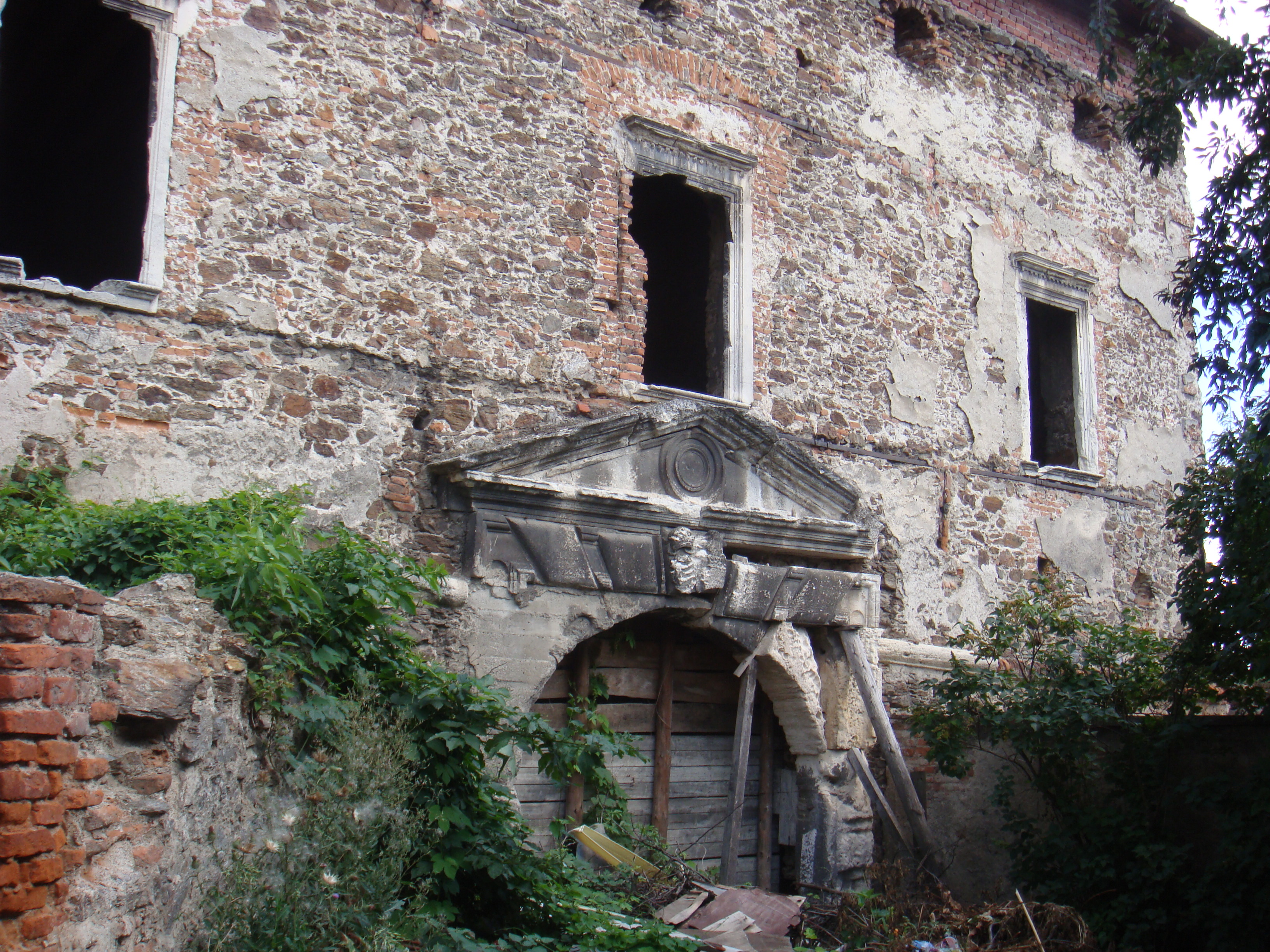 Poza 3